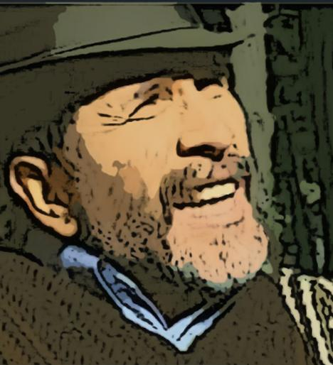 El Rey Pobre